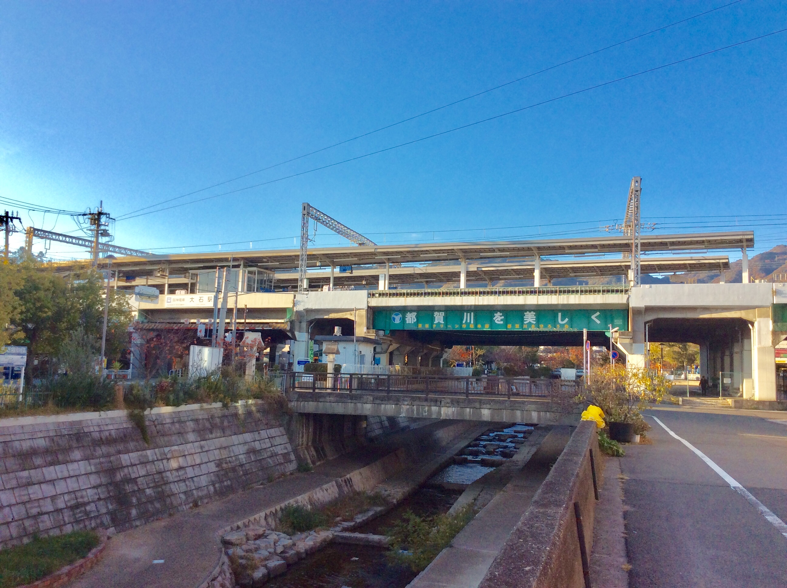 阪神電車大石駅